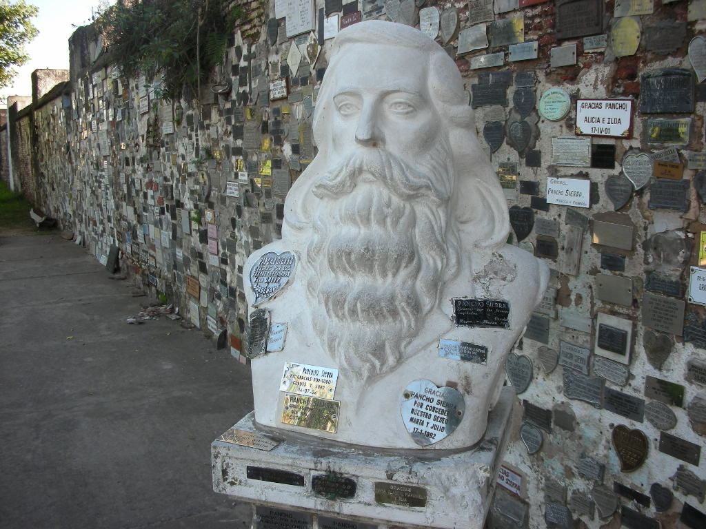 Estatuta de Pancho Sierra en las afueras del Cementerio Local de Salto